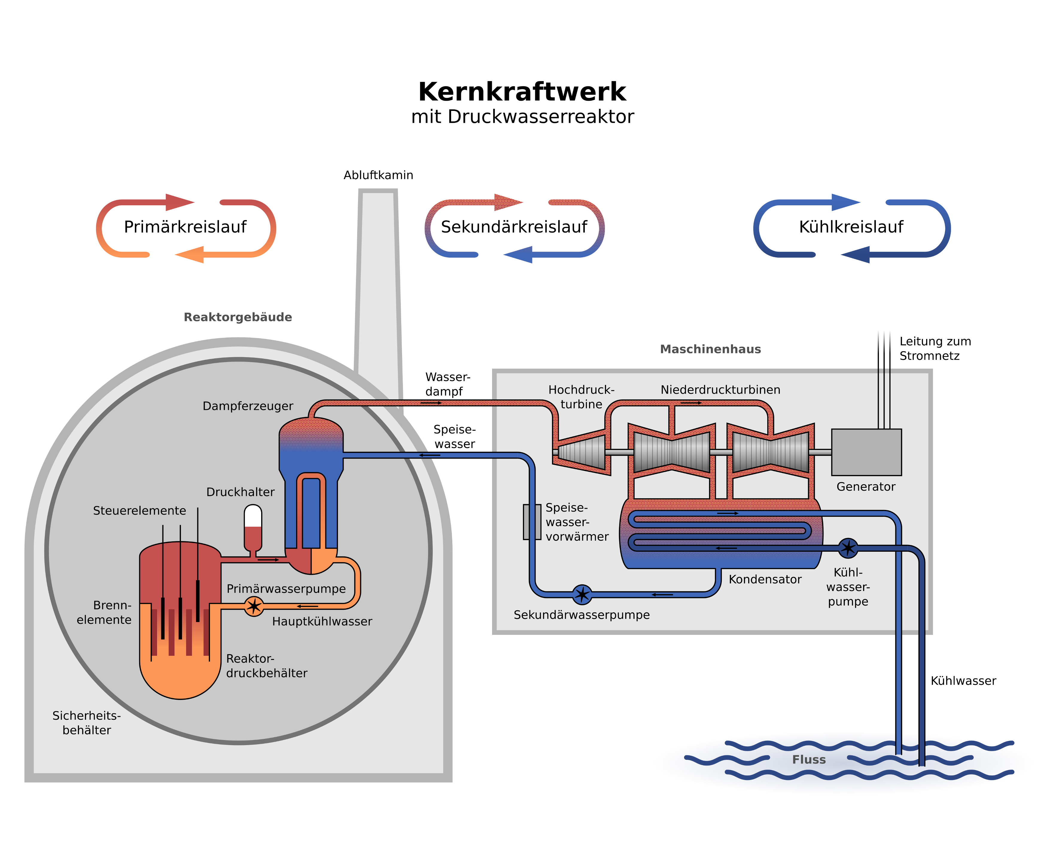 Schema eines Kernkraftwerk mit Druckwasserreaktor (ohne optionalen Kühlturm)